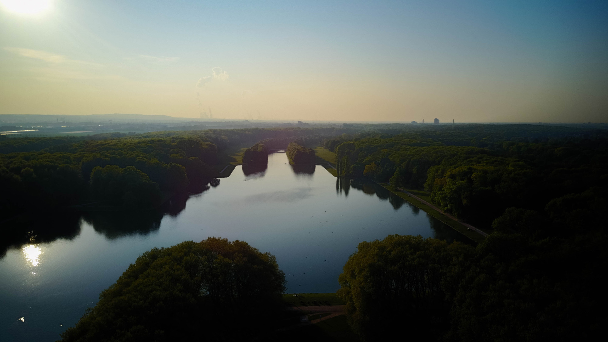 Der Decksteiner Weiher gehört zu den größten Seen im Grüngürtel von Köln, einem beliebten Naherholungsgebiet für die Städter.